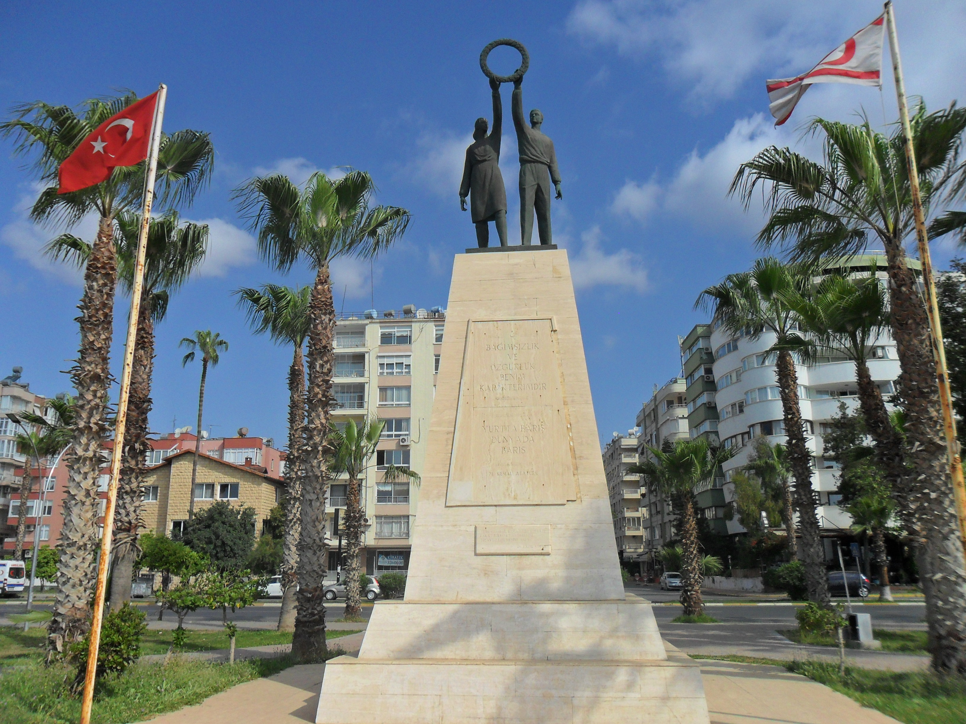 Mersin sahil şeridinde yer alan Kıbrıs Barış Harekâtı Anıtı.